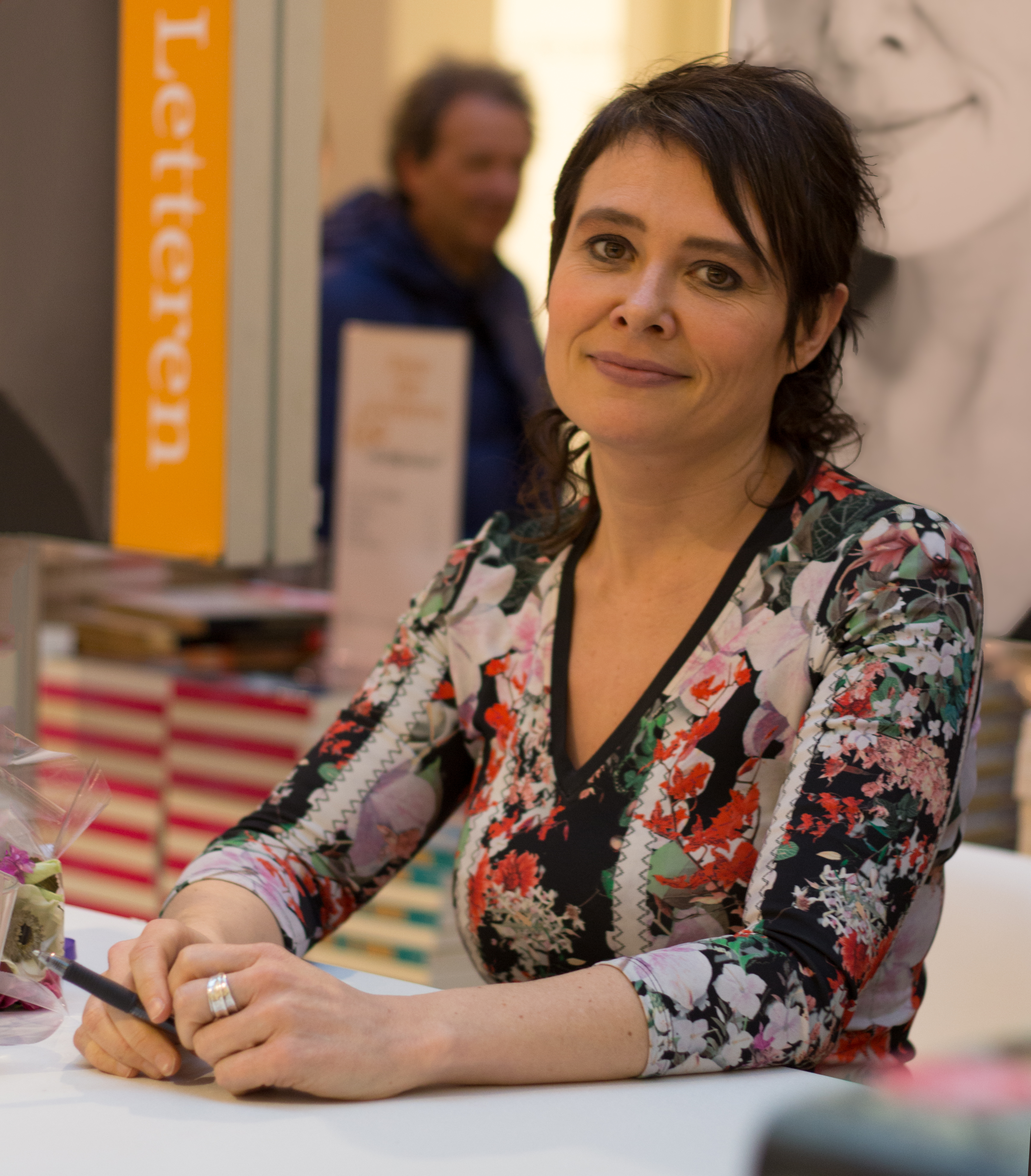 Griet Op de Beeck